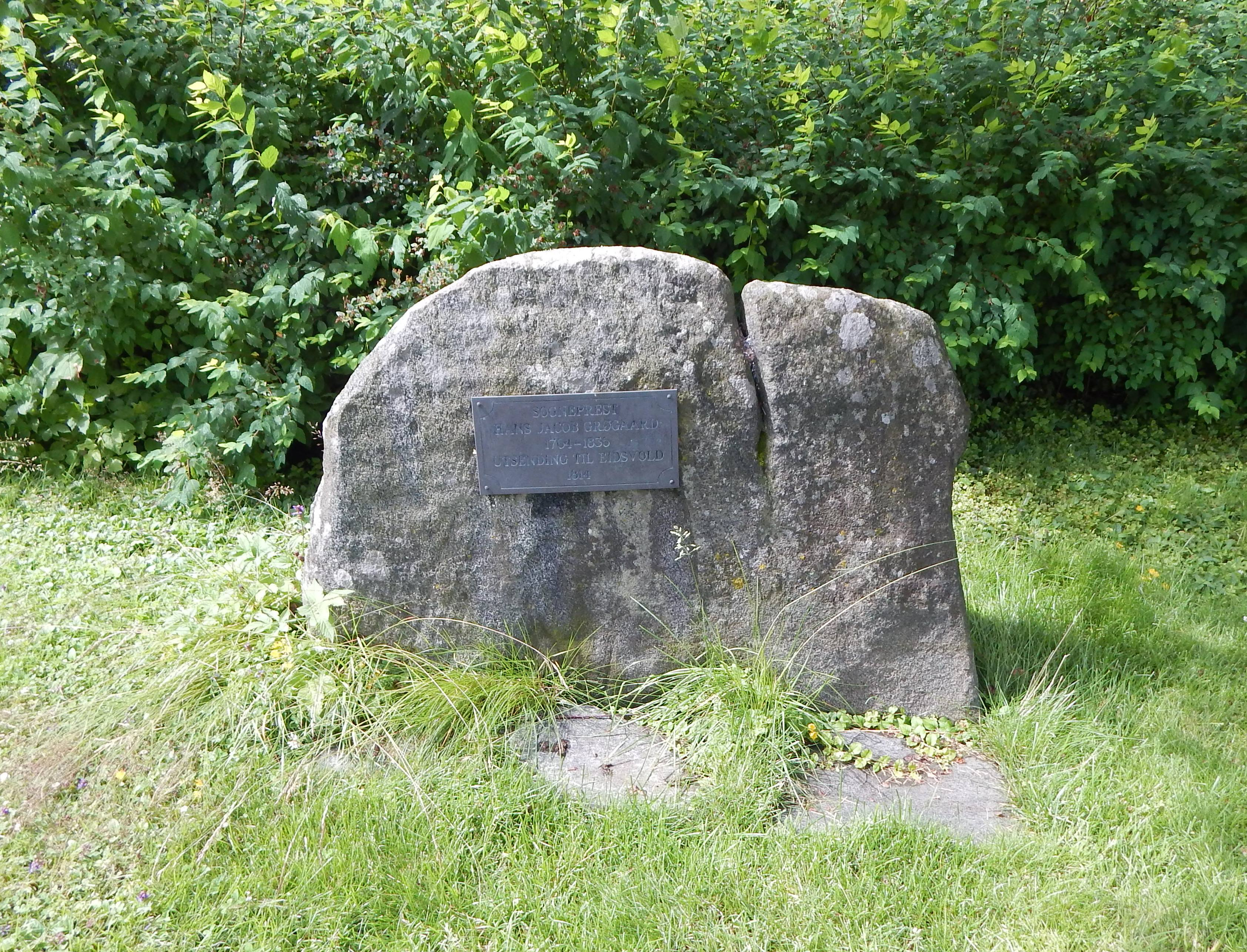 Minnesmerke over eidsvollsmannen Hans Jacob Grøgaard ved Høvåg kirke